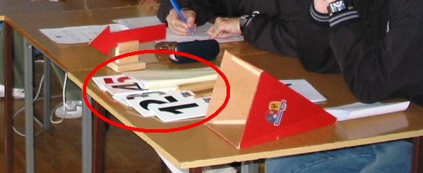 Tabliczki fauli leżące na stoli sędziowskim (koszykówka)